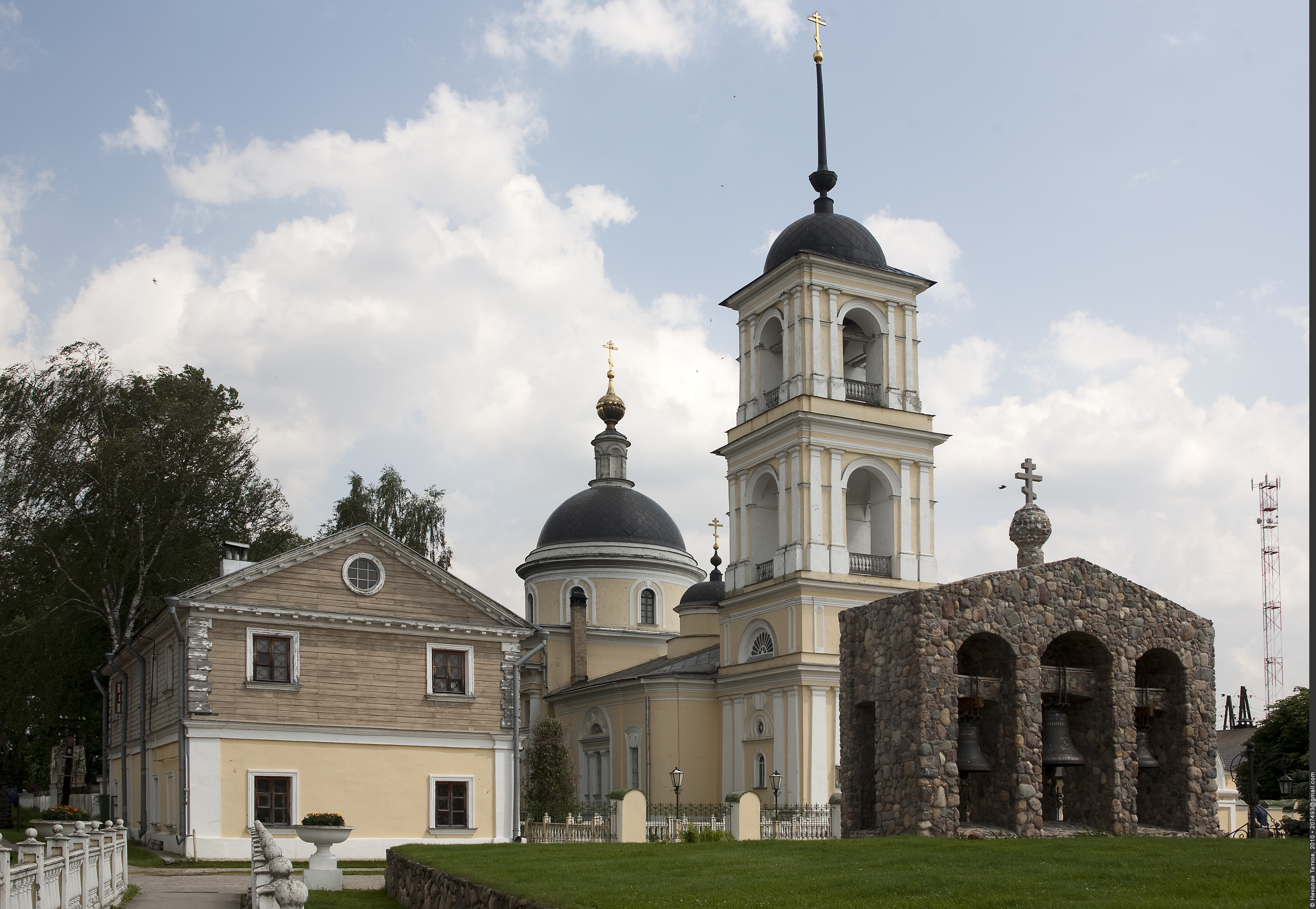 Однокупольный храм в стиле ампир с трапезной и трёхъярусной колокольней. В трапезной приделы Пятницкий и преподобной Марфы. Закрыт в 1937 году, вновь открыт в 1945 году.